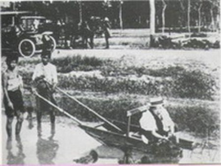 Queen Saovabha Phongsri will do farming at Thung Phayathai